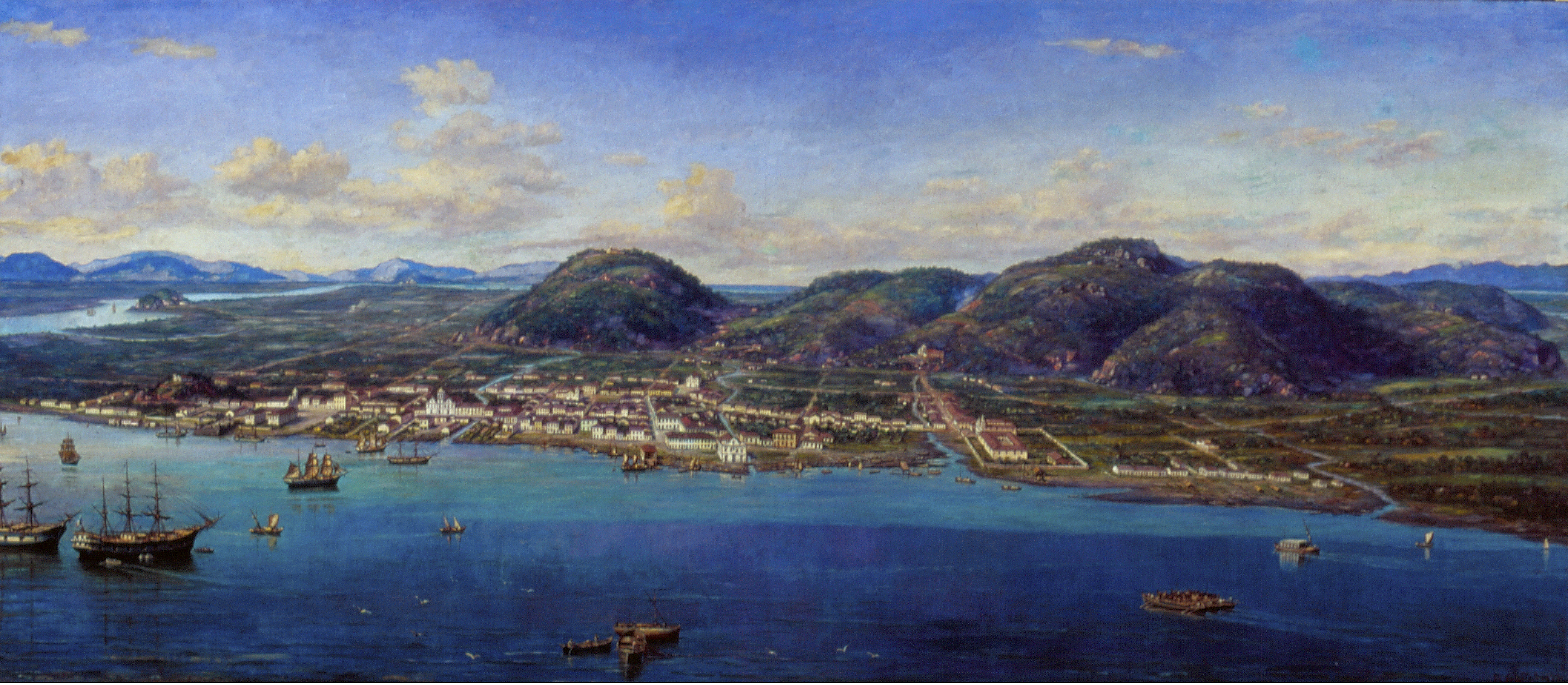 Obra que integra o acervo do Museu Paulista da USP. Coleção Benedito Calixto de Jesus - CBCJ